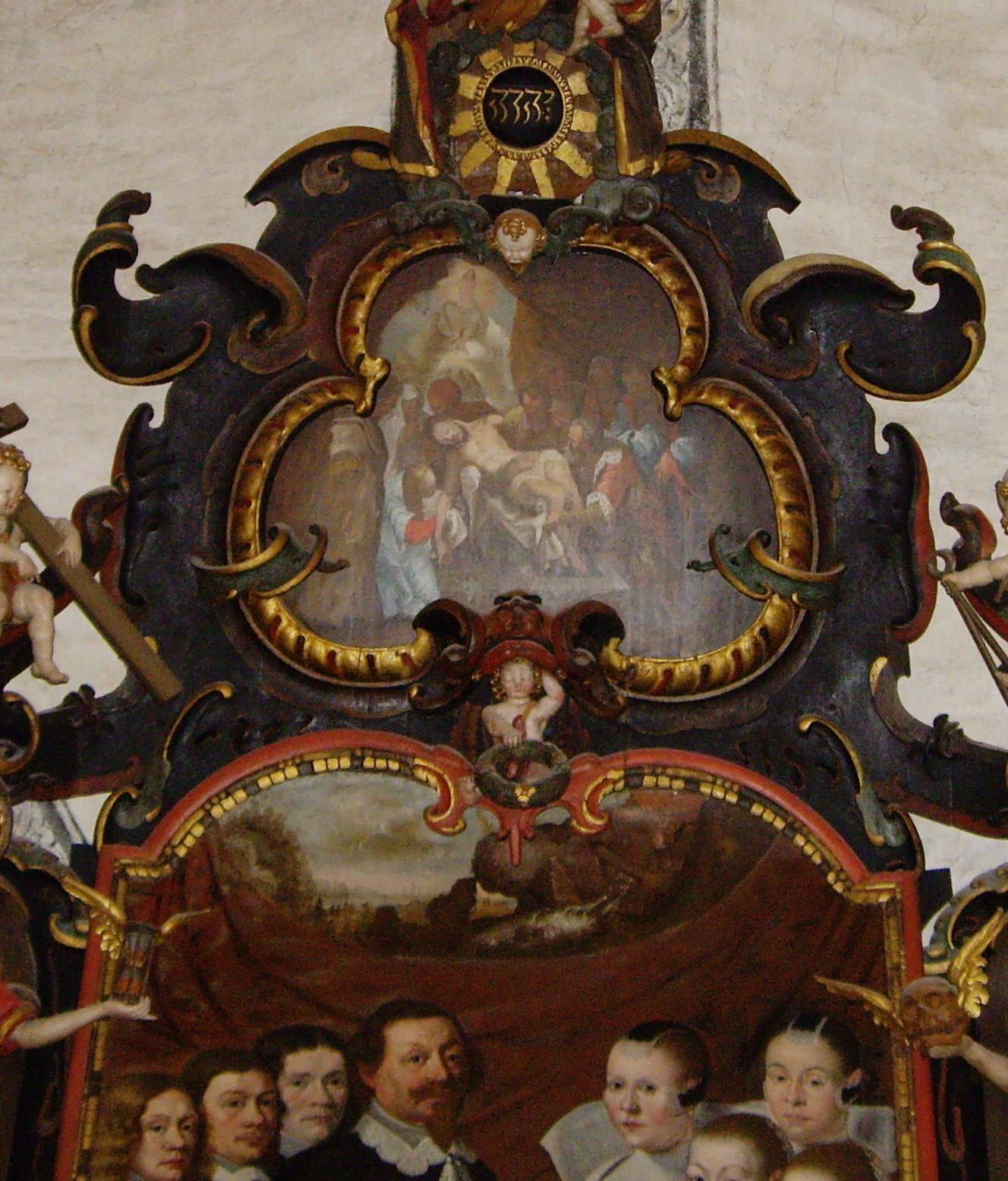 Heliga kors kyrka i Ronneby - Epitafium från 1651 med tetragrammet JHWH i den runda solsymbolen